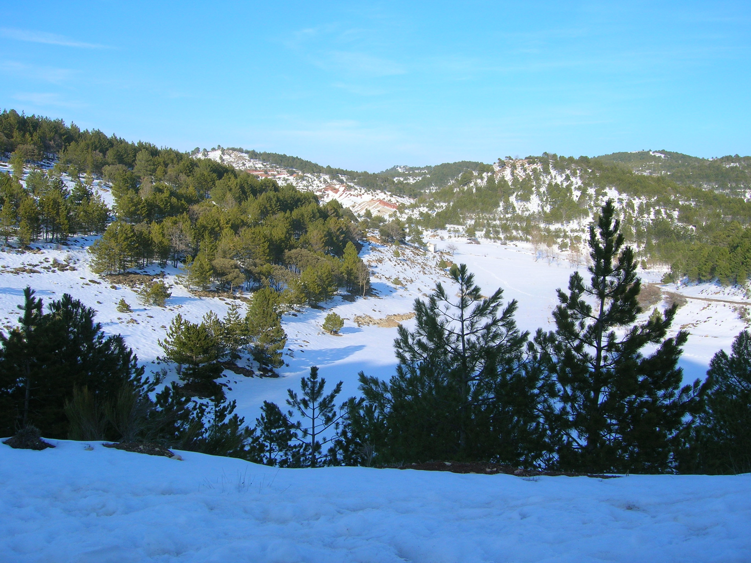 Puerto del Barrancazo, en Alcaraz (Albacete, España). 2 de marzo de 2006.